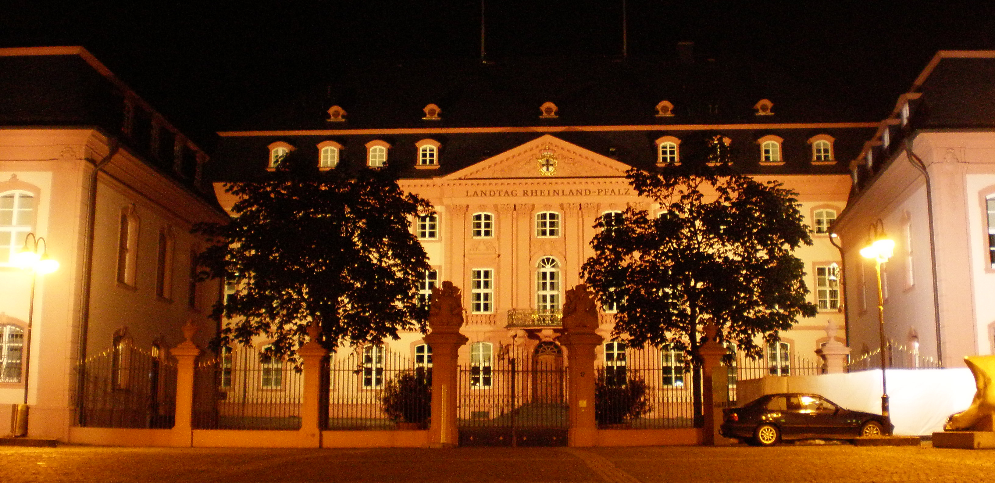 Landtagsgebäude des rheinland-pfälzischen Landtages in Mainz bei Nacht